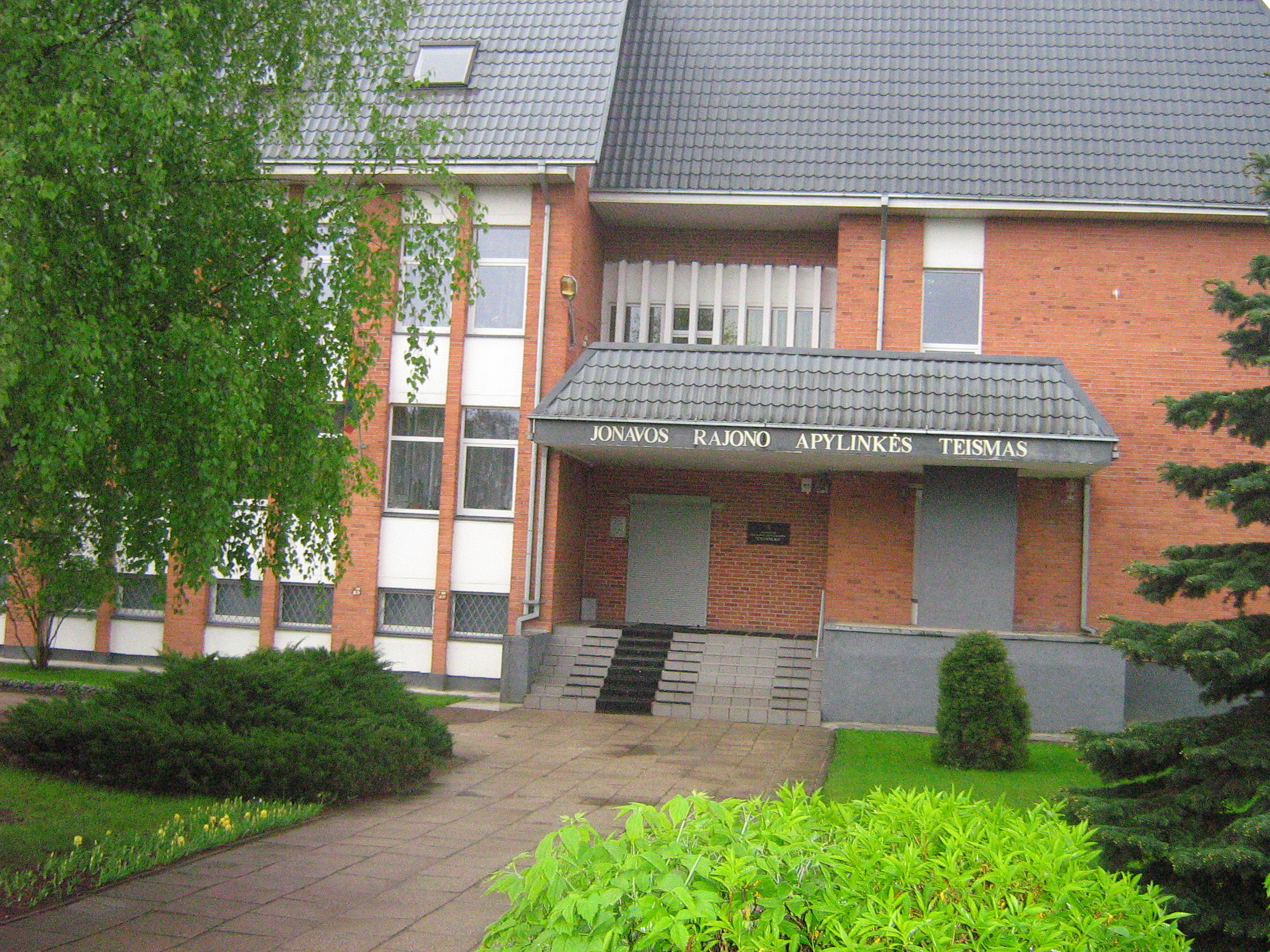 Jonavos rajonos teismo rūmai vasario 16g.